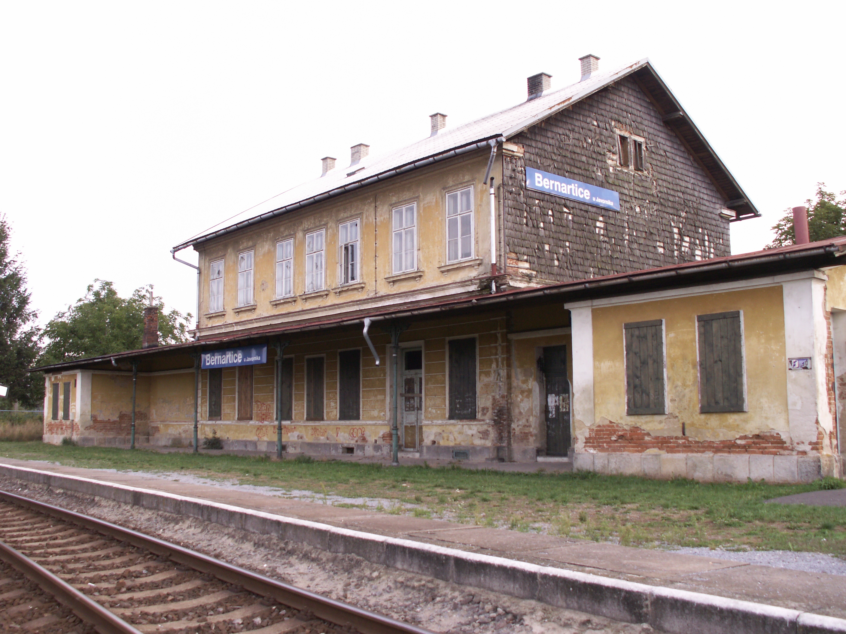 Bernartice, okres Jeseník, budova železniční stanice (č.p. 244)